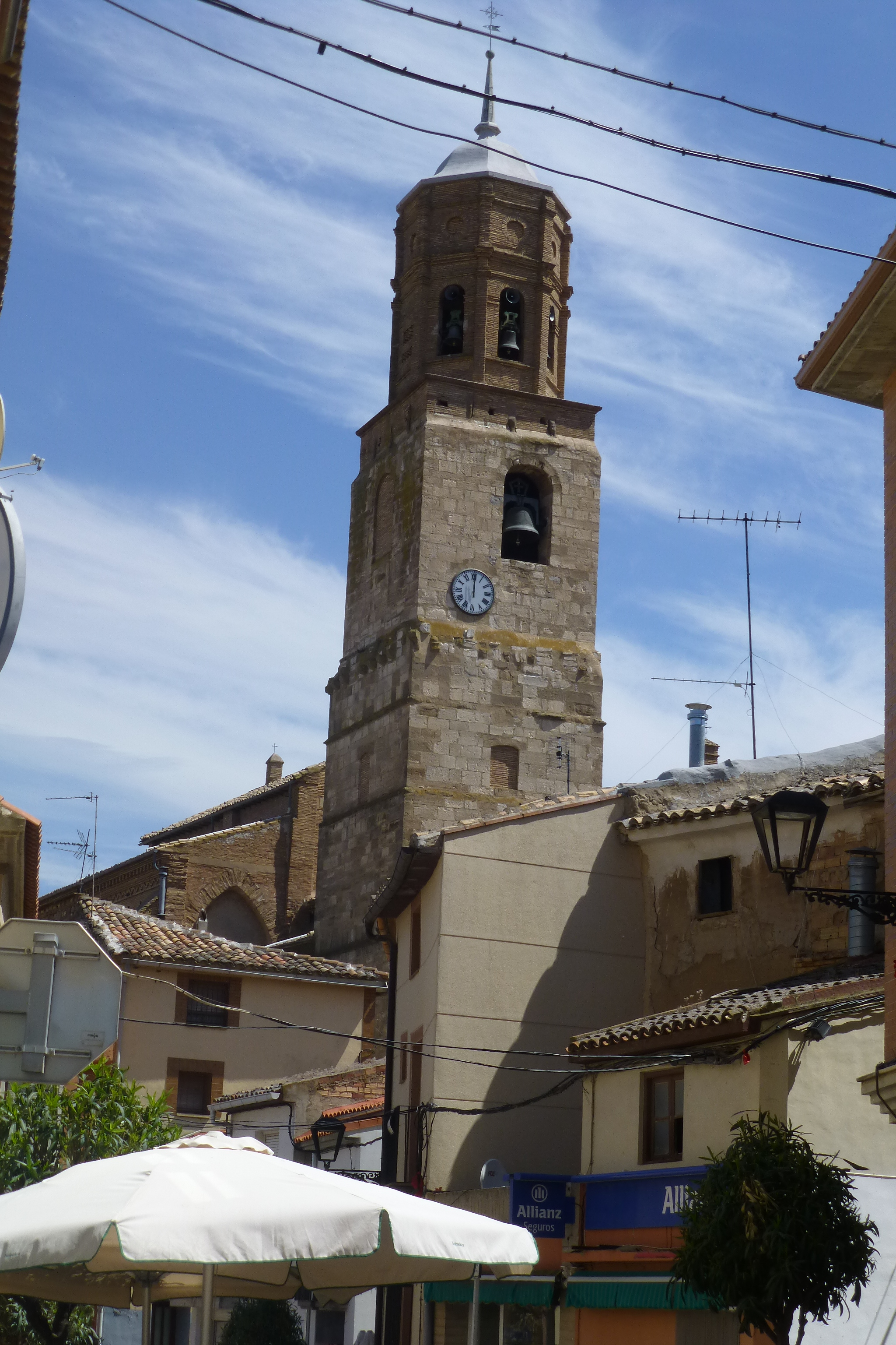 Vista parcial de la localidad navarra de Ablitas. Al fondo la Iglesia de Santa María Magdalena.